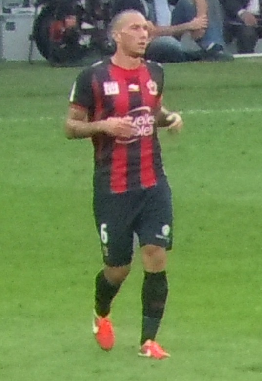 Didier Digard le 22 septembre 2013